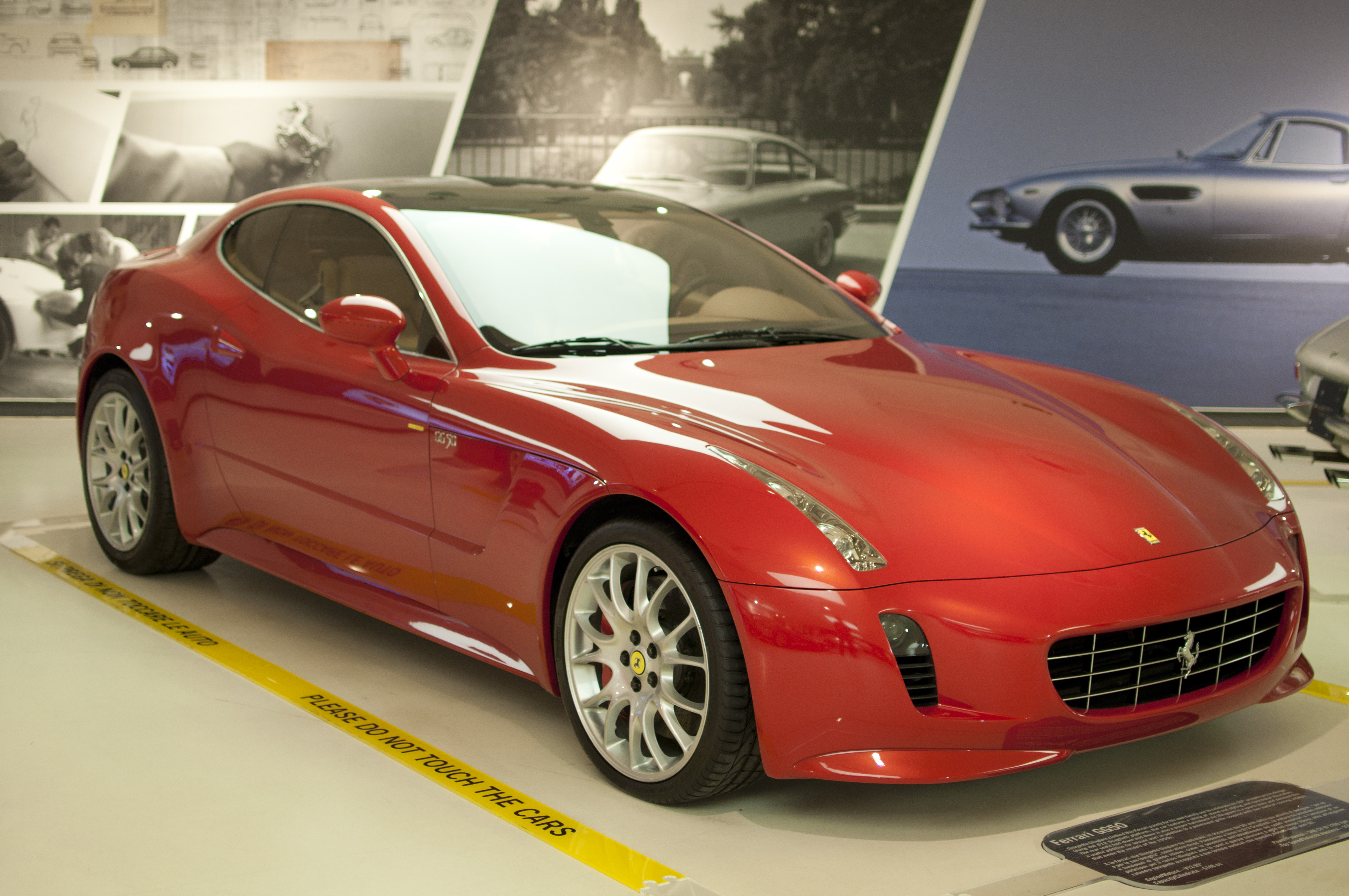 Automotive Design Legends Giorgetto Giugiaro personal car.